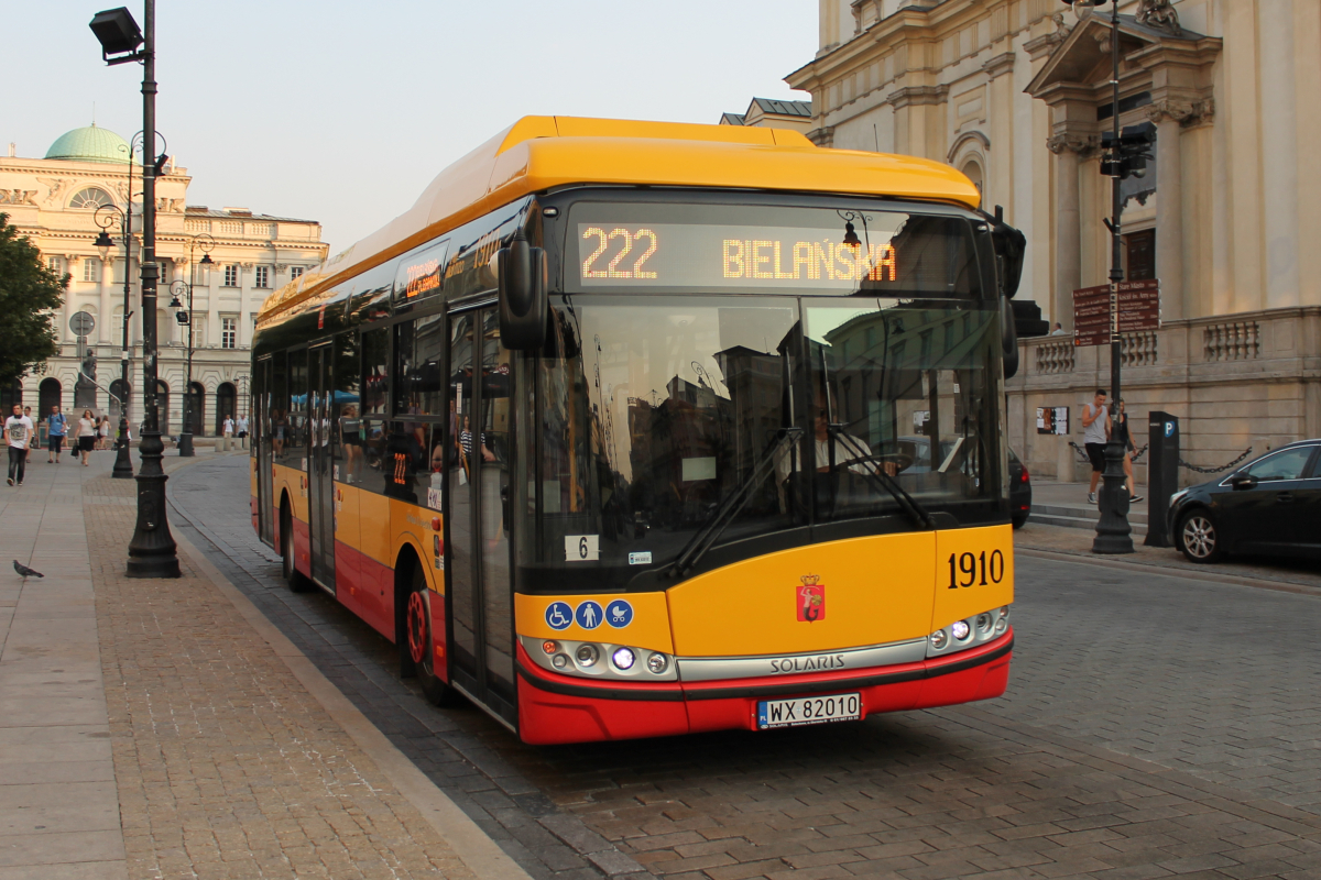 Warszawski autobus elektryczny Solaris Urbino 12 electric na ul. Krakowskie Przedmieście.